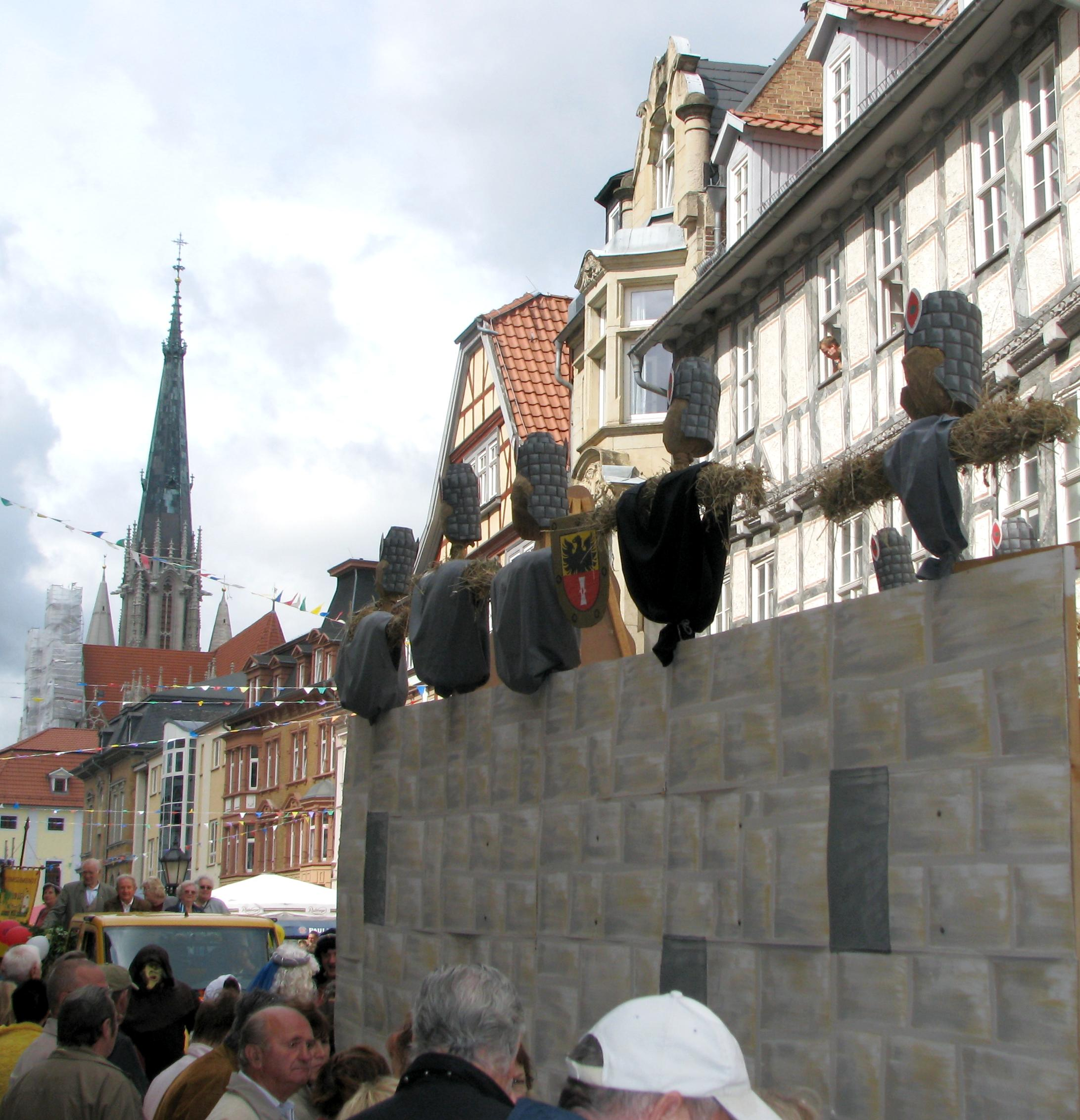 Ein Motivwagen im Mühlhäuser Kirmesumzug thematisiert die Sage um die Blinden Hessen.